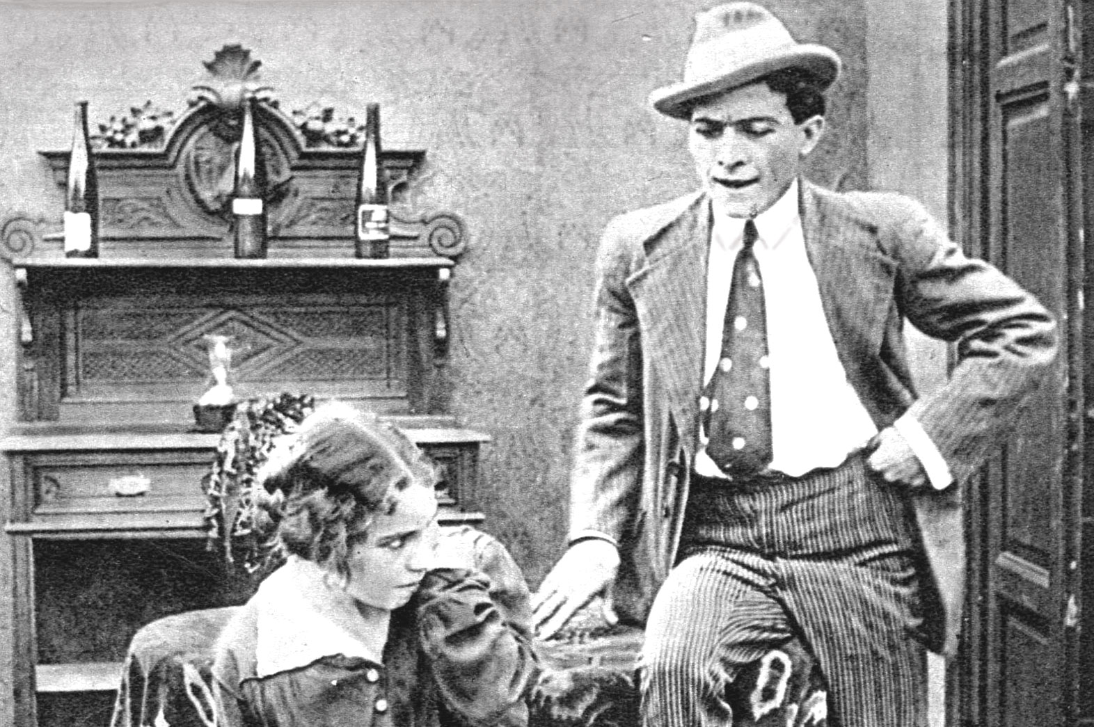 Virginia Balistrieri e Ettore Mazzanti in Sperduti nel buio (Martoglio, 1914)